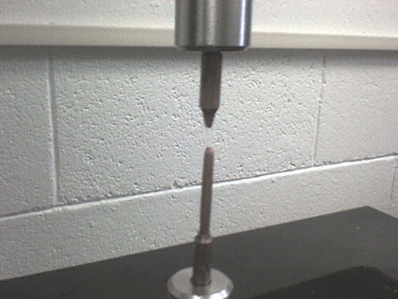 Máquina de ensayo de tensión por computadora, del laboratorio de Introducción a los Materiales, Universidad Autónoma Metropolitana, UAM Azcapotzalco.